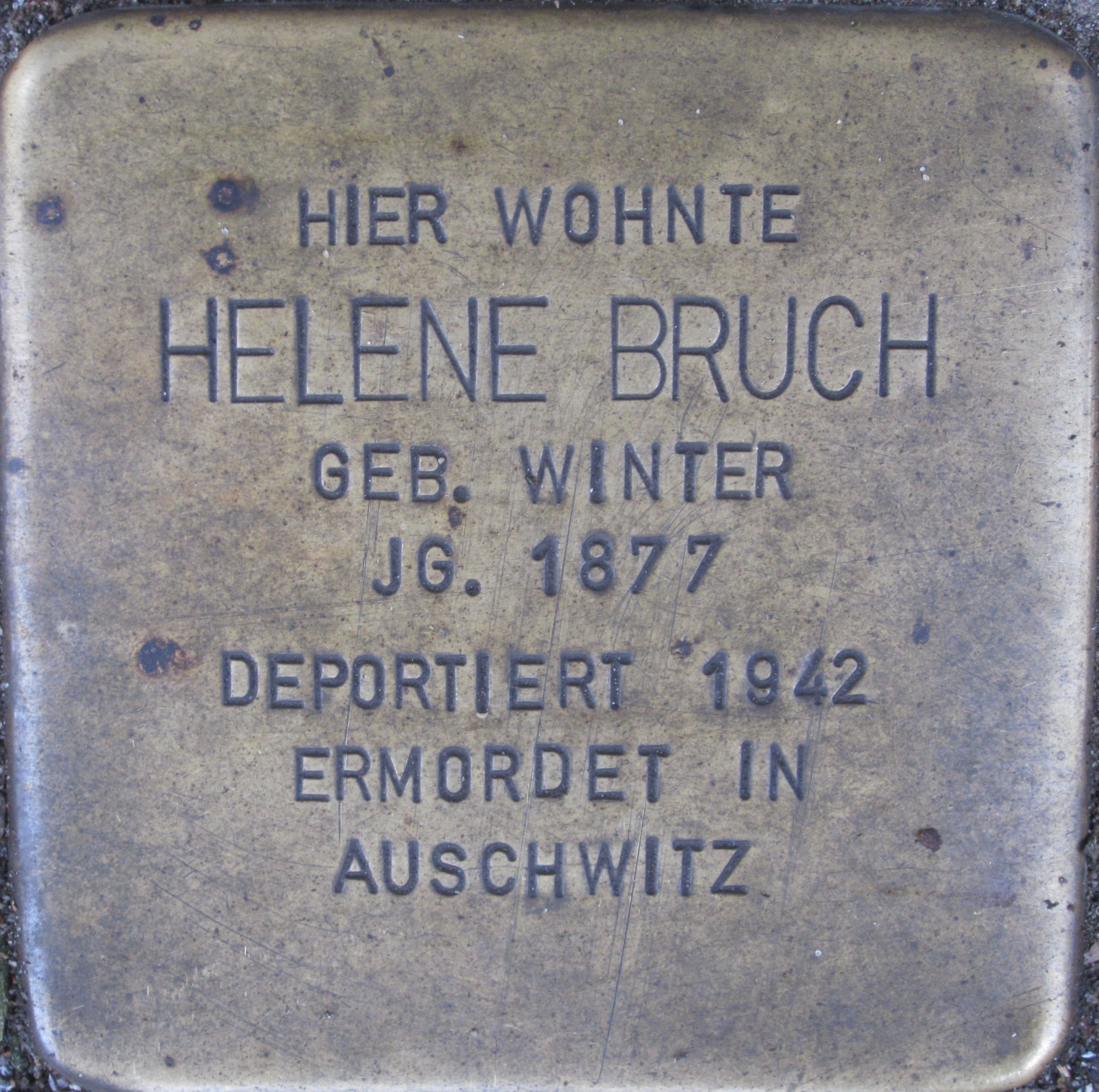 Stolperstein der Helene Bruch, Lünen-Süd, Jägerstr. 45 A